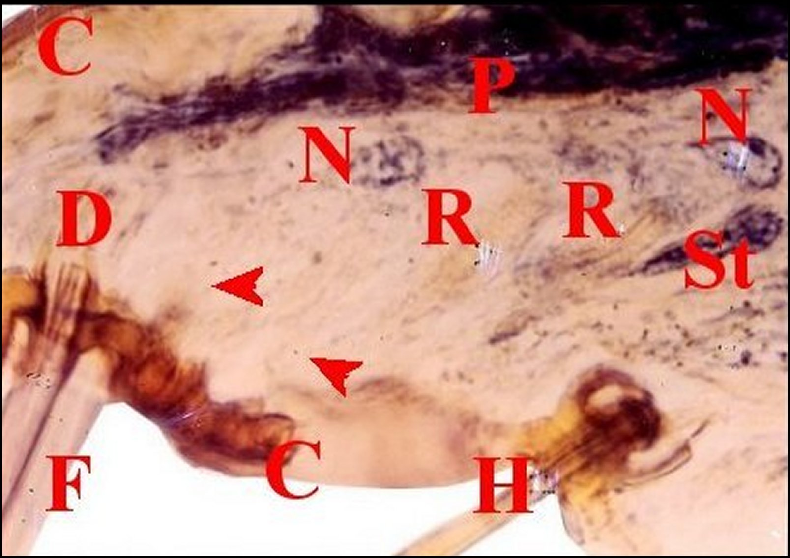 Autres glandules tégumentaires de l'épigastre de Meta menardi en coupe histologique